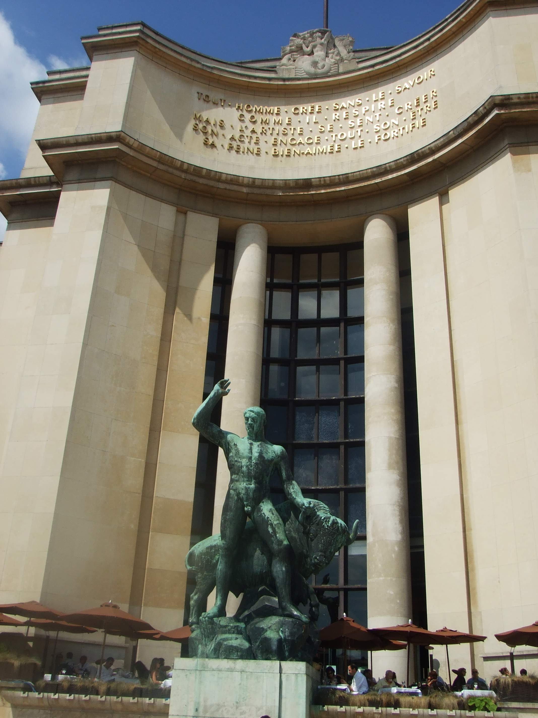 Palais de Chaillot à Paris (Île-de-France, France).